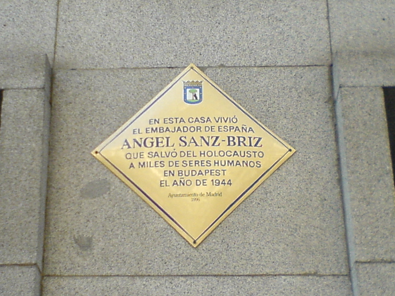 Placa en memoria del diplomático español Ángel Sanz-Briz, que salvó a cientos de judíos del Holocausto en Hungría en 1944. La placa la colocó el Ayuntamiento de Madrid (España) en el portal de su casa en la calle Velázquez.